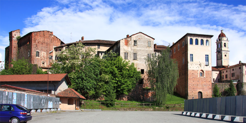 Veduta di Buronzo con il castello consortile e la parrocchiale